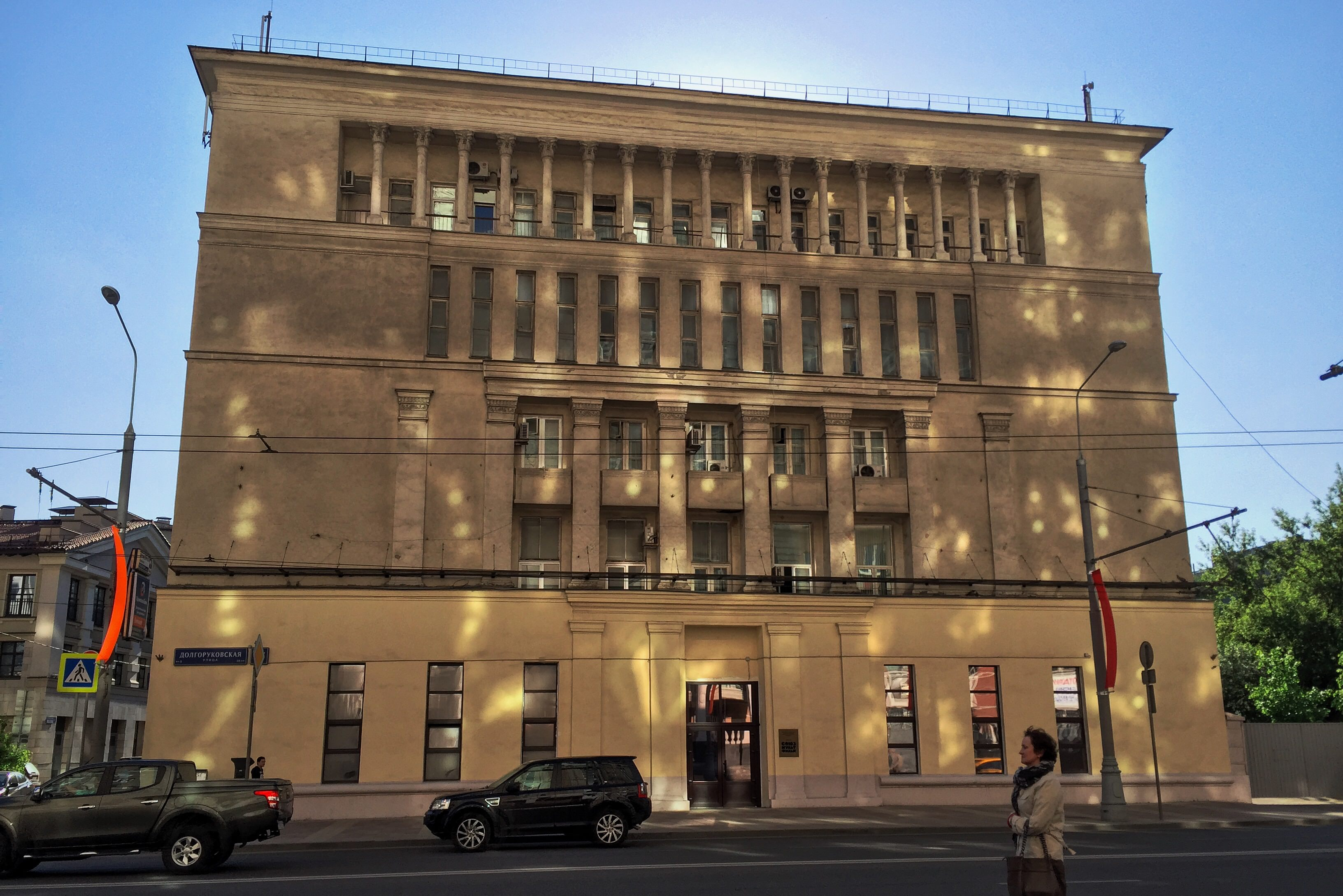 Долгоруковская улица. Киностудия «Союзмультфильм». Перестроенная часть бывшего храма Святого Николая в Новой слободе Moscow in 2016; Москва в 2016